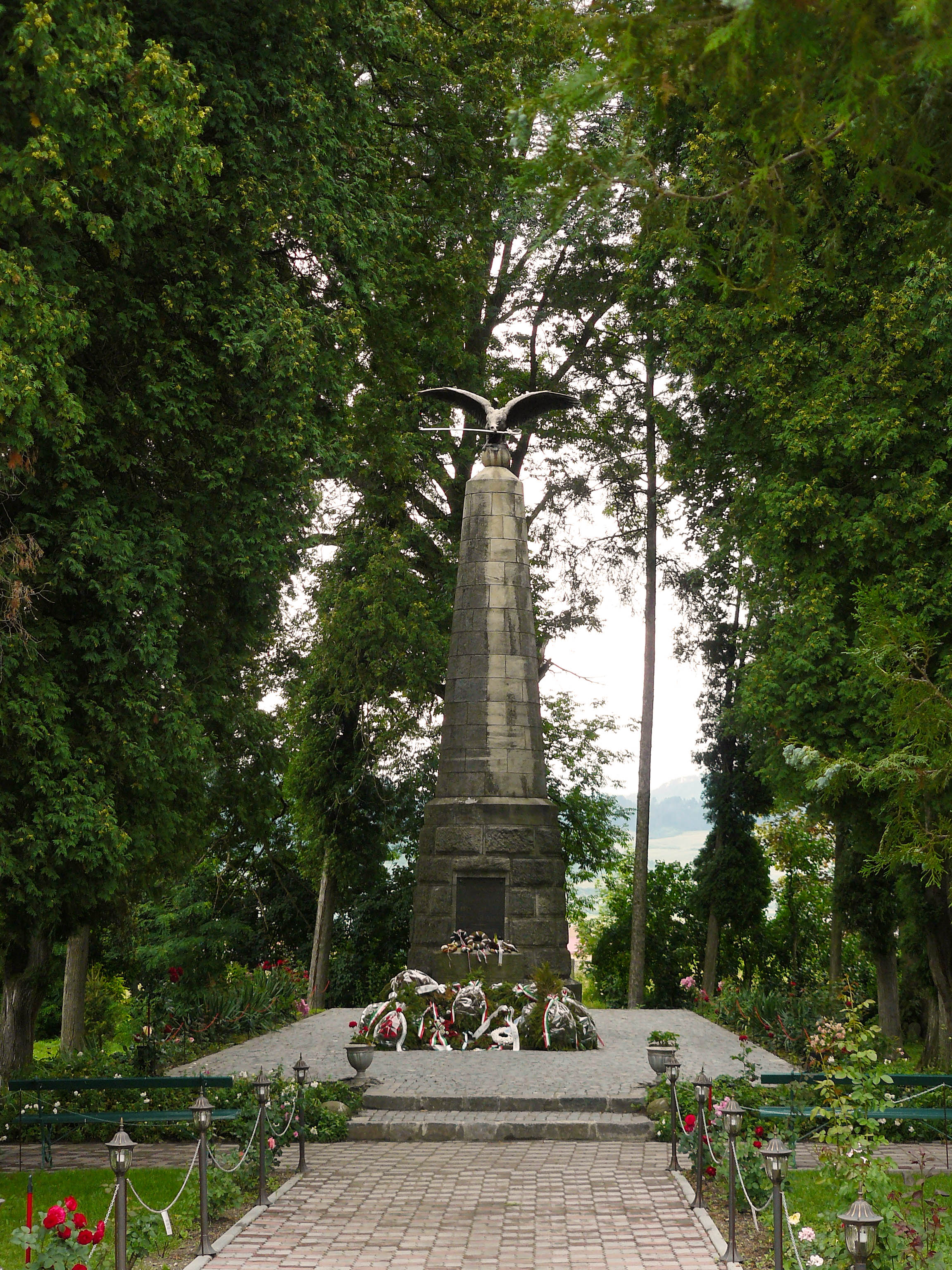 Memorial Sándor Petőfi à Albeşti, Roumanie